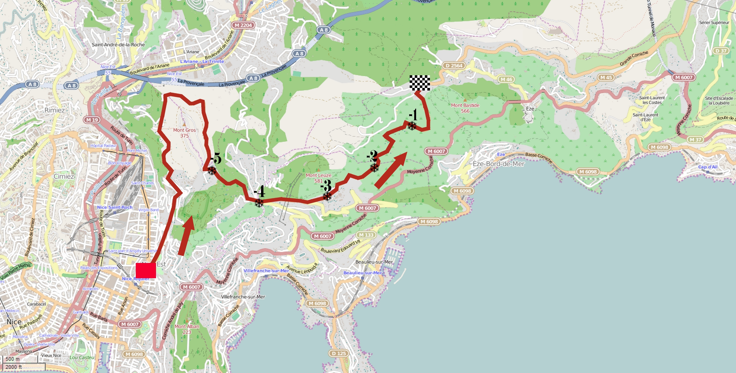 Parcours de la septième étape de Paris-Nice 2015. This map may be incomplete, and may contain errors. Don't rely solely on it for navigation.